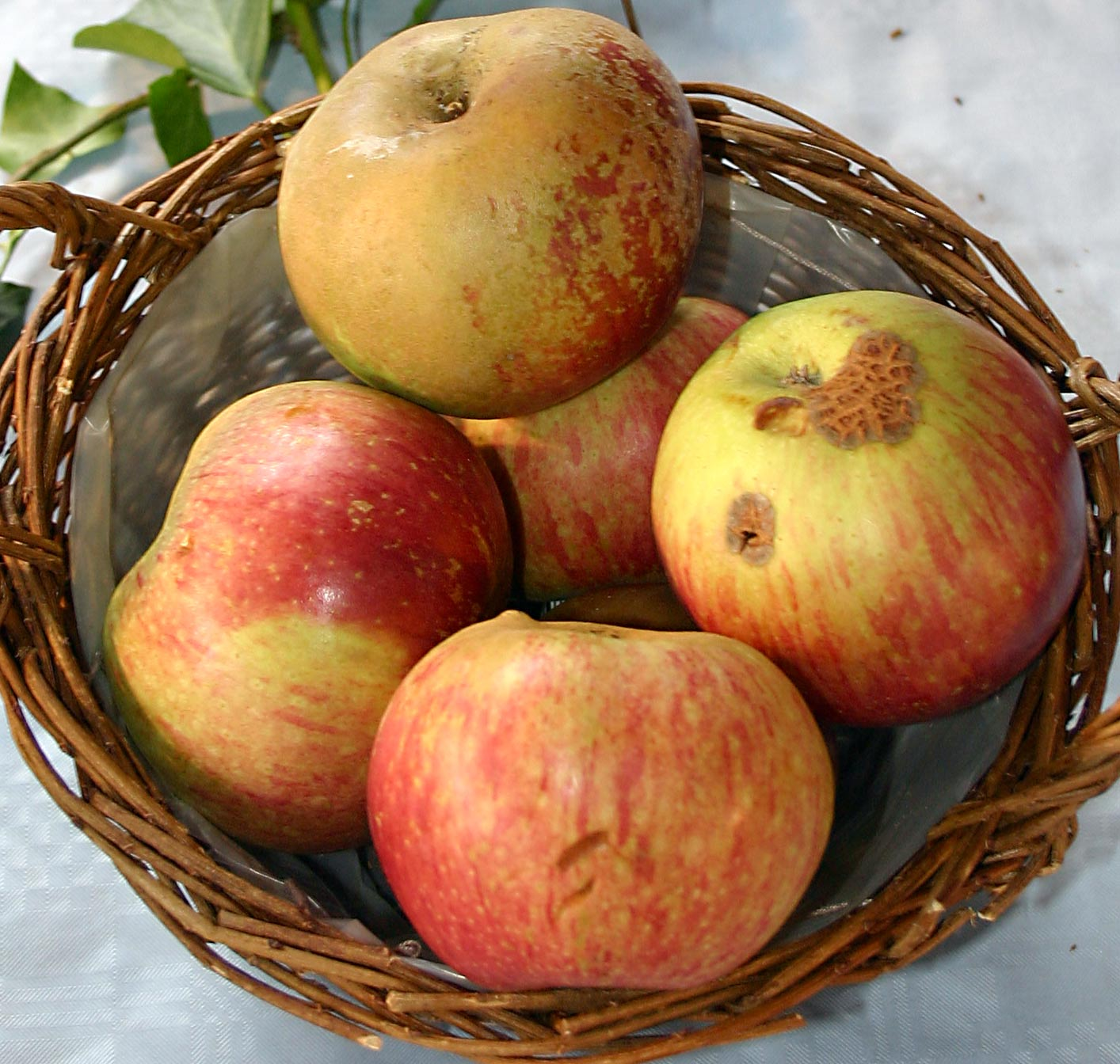 Malus "Baumanns Renette" , Büdingen